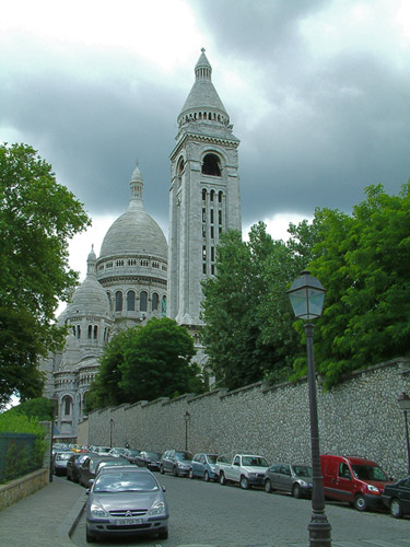 Secré-Coeur